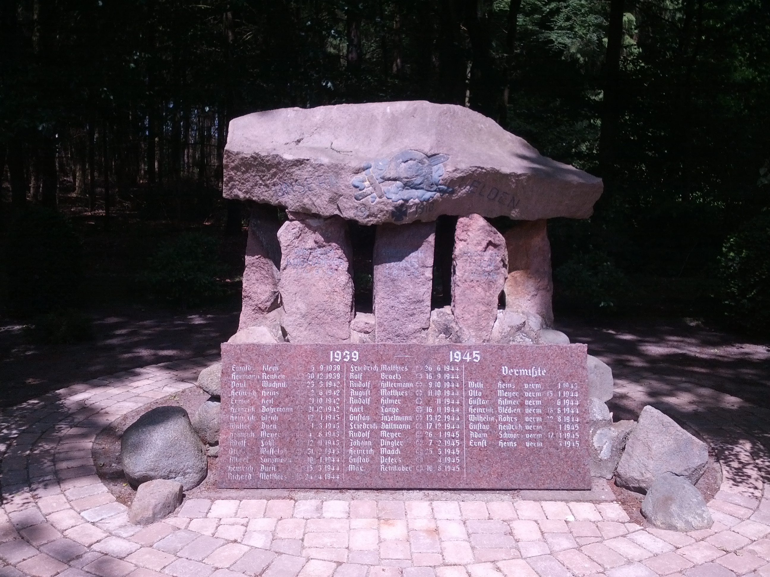 Kriegerdenkmal in Kamp